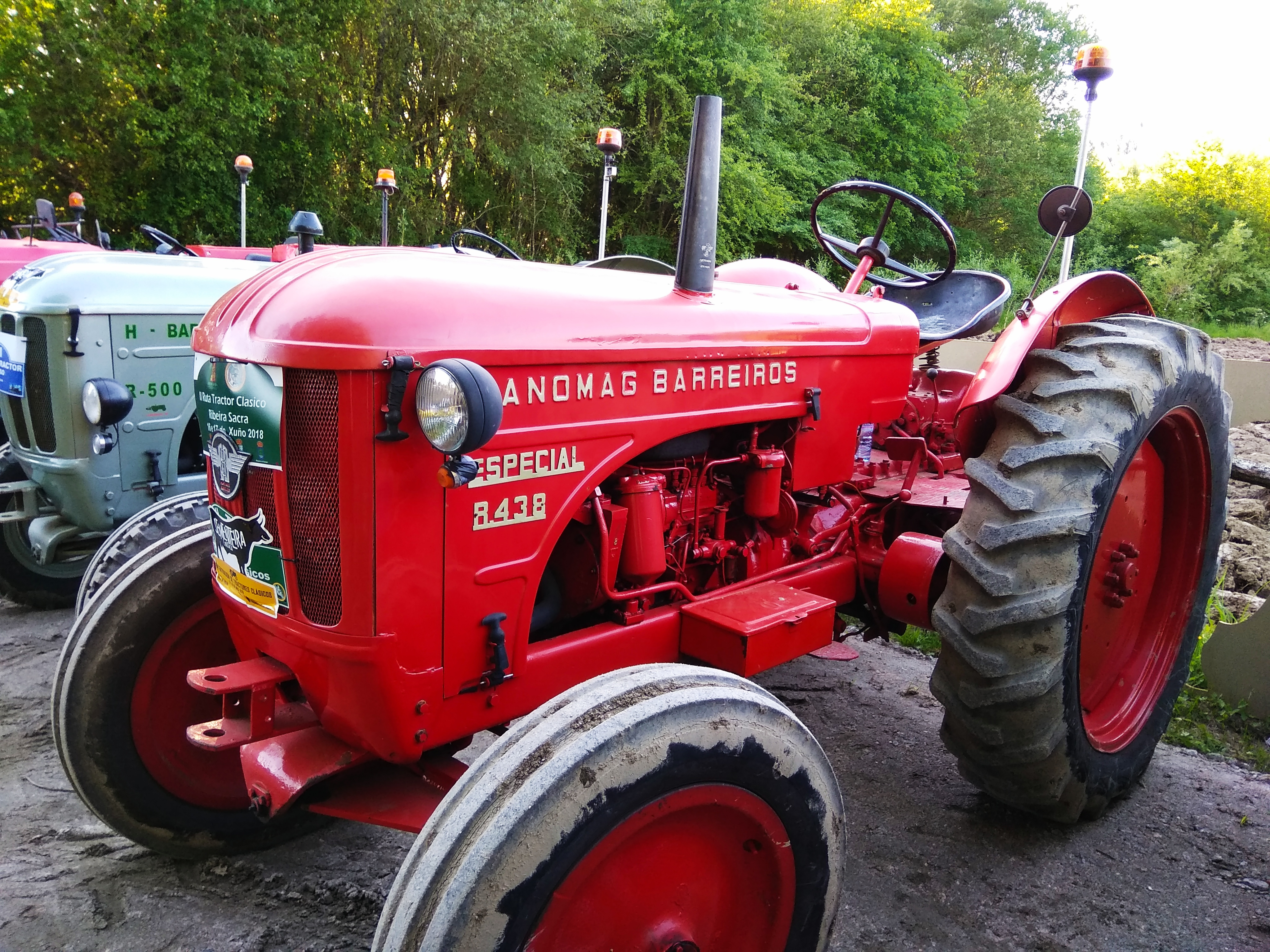 Fotografía realizada na XII Sementeira e Música na parroquia de San Miguel de Corzáns (Salvaterra de Miño, Pontevedra)